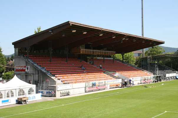 Tribüne vom Stadion Brügglifeld z Aarau